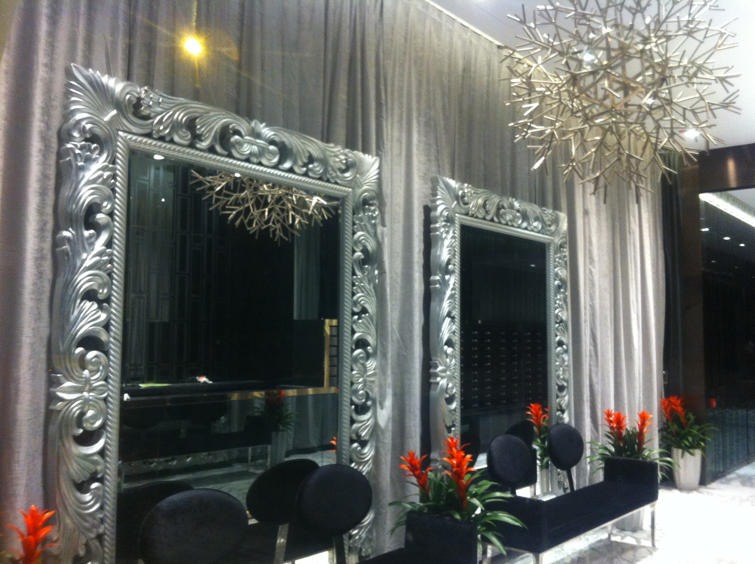 中文（香港）: 上環 night 士丹頓街 Staunton Street 尚賢居